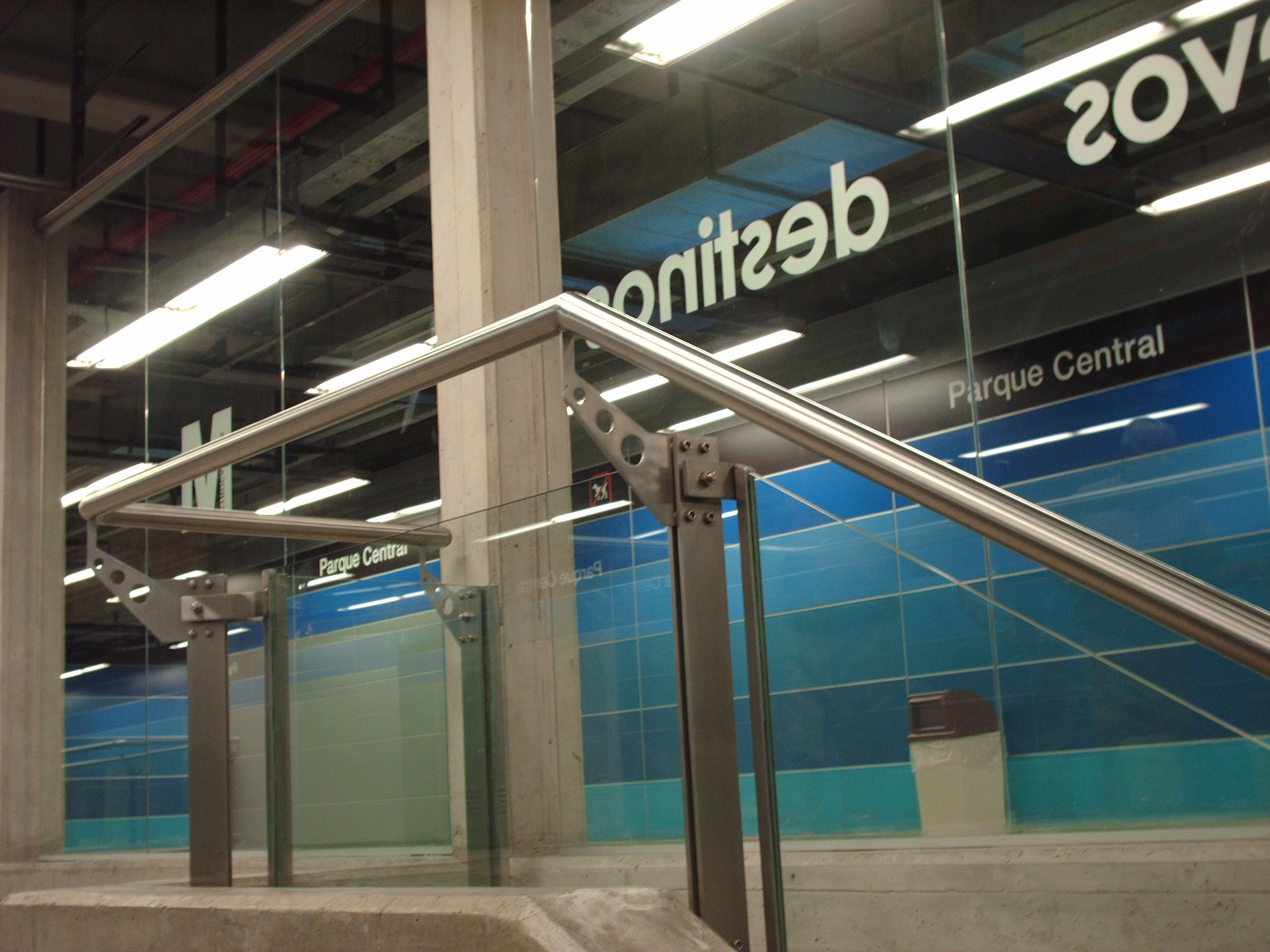 Estación Parque Central, L4